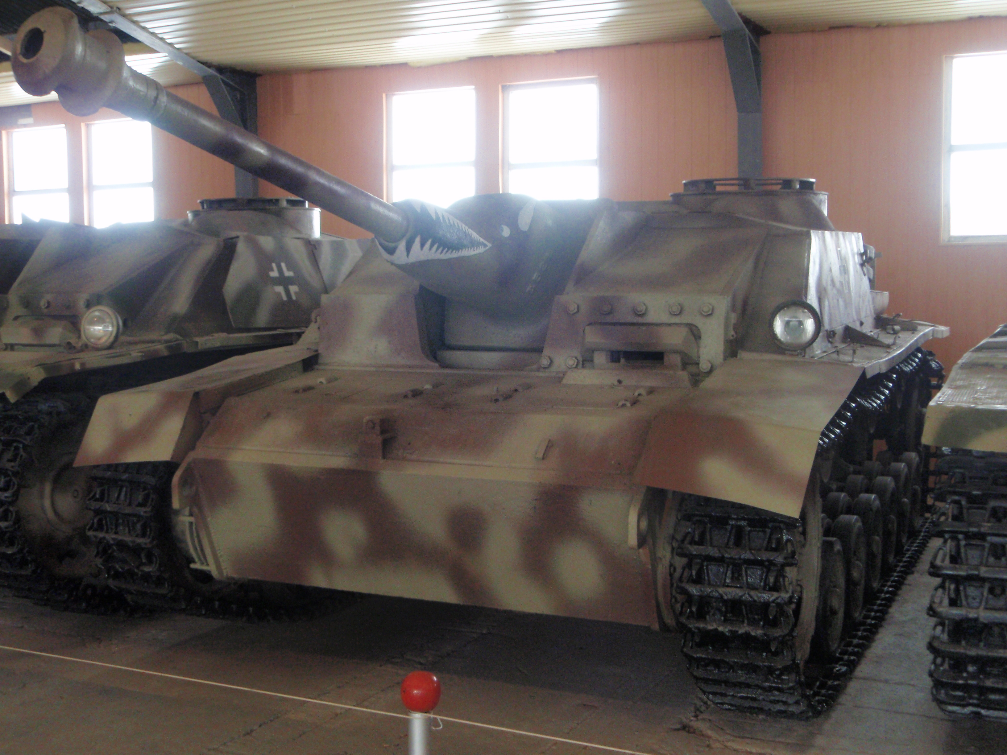 Немецкая САУ StuG40 Ausf.G в Кубинке